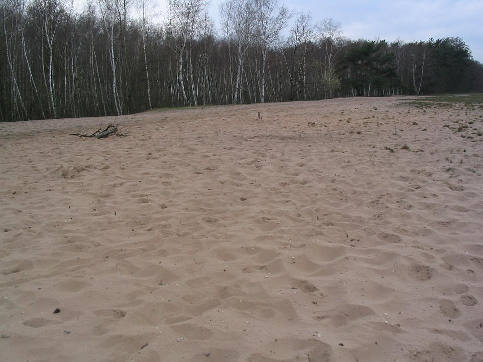 Silbergrasflur bei Birkenheide, selbst fotografiert am 26.3.2005, GNU-FDL